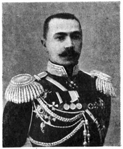 генерал К. А. Кондратович. Эта фотография была использована для иллюстрирования статьи «Кондратович, Киприан Антонович» опубликованной в тринадцатом томе «Военной энциклопедии», который был издан книгоиздательским товариществом И. Д. Сытина в 1913 году в столице Российской империи городе Санкт-Петербурге. Более подробное описание к этой картинке можно прочесть в указанной выше статье.